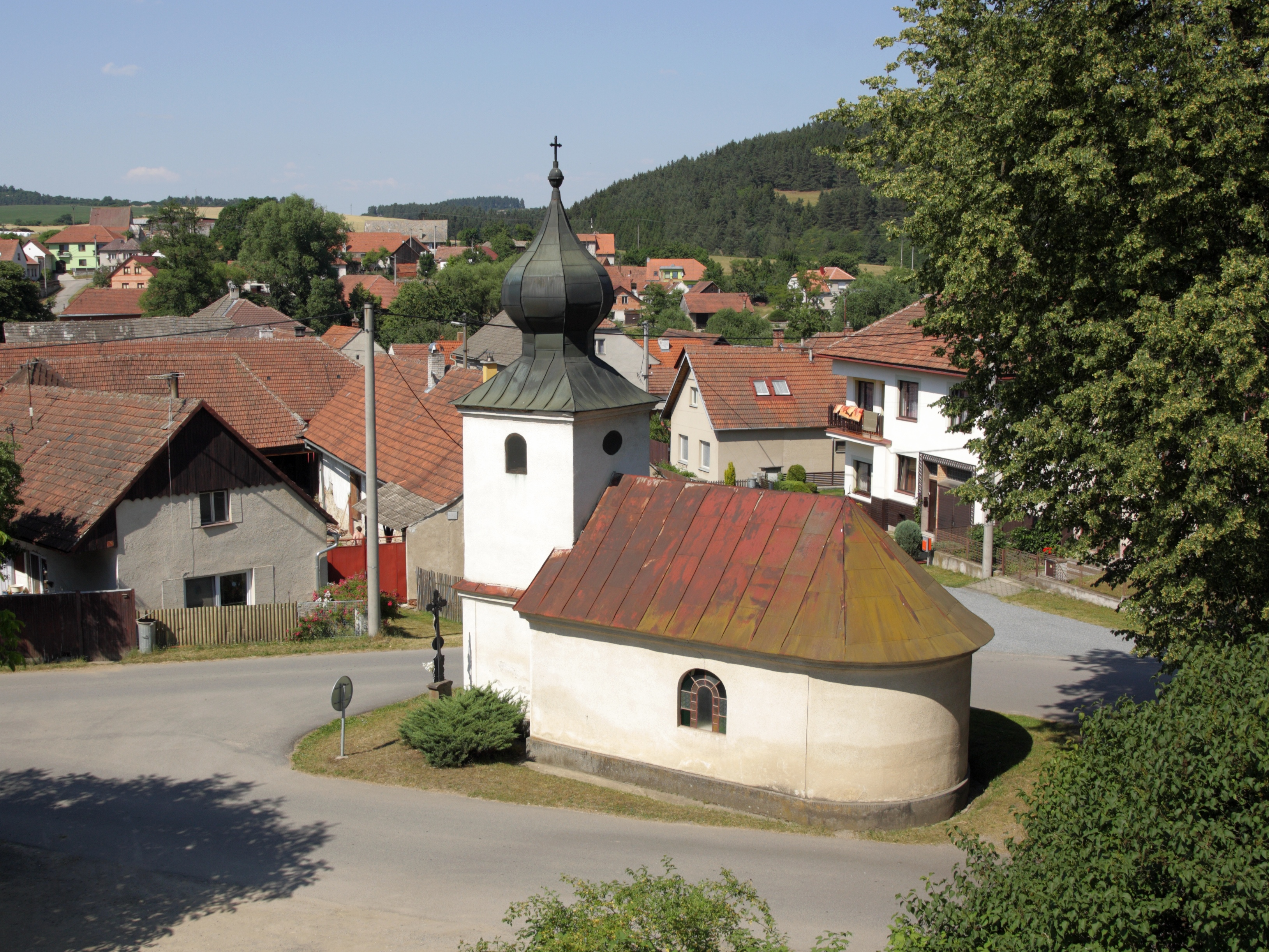 Číchov - jižní část obce s kaplí.